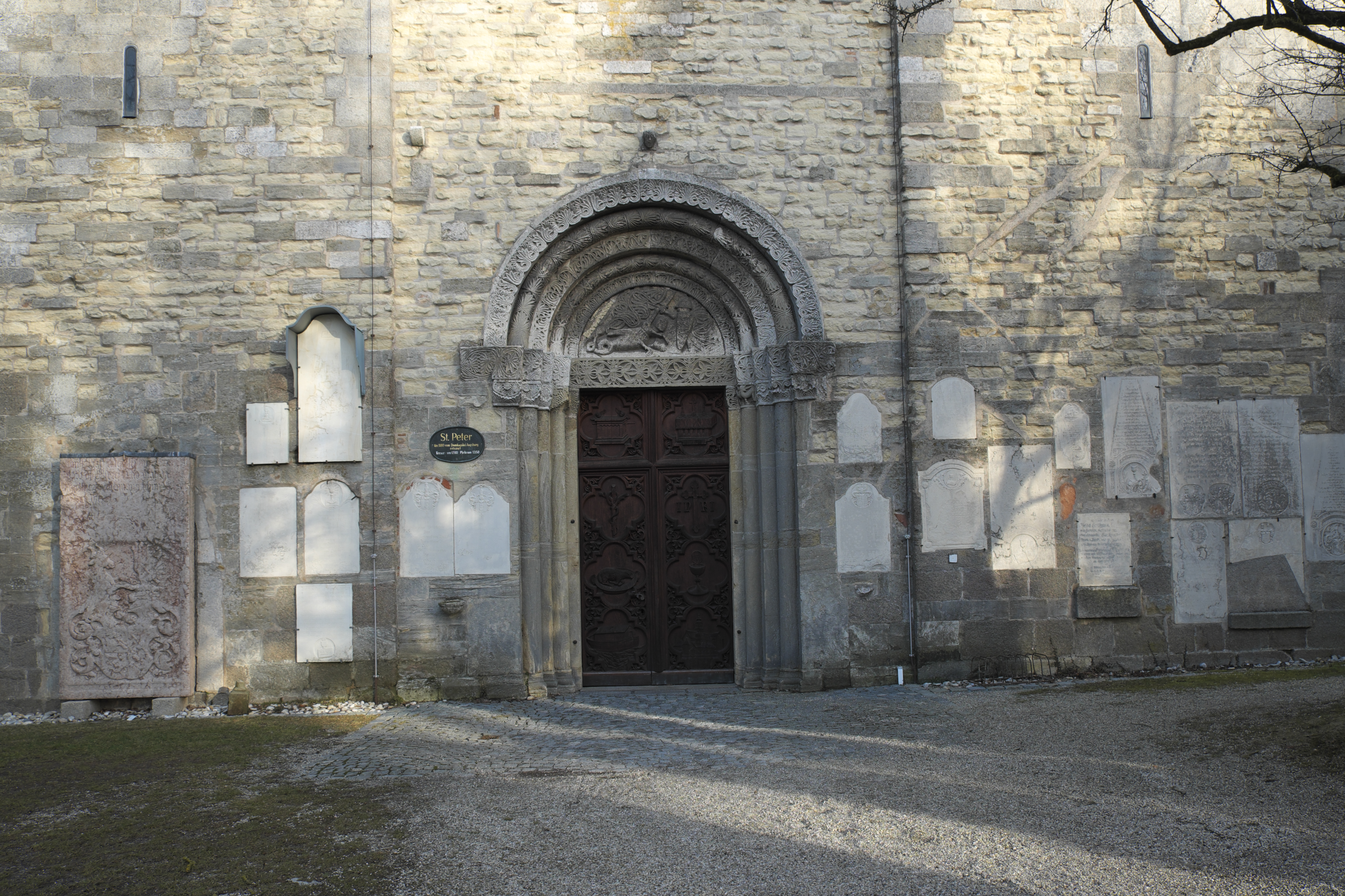 Alte katholische Pfarrkirche St. Peter in Straubing (Bayern/Deutschland), romanisches Westportal mit Tympanon